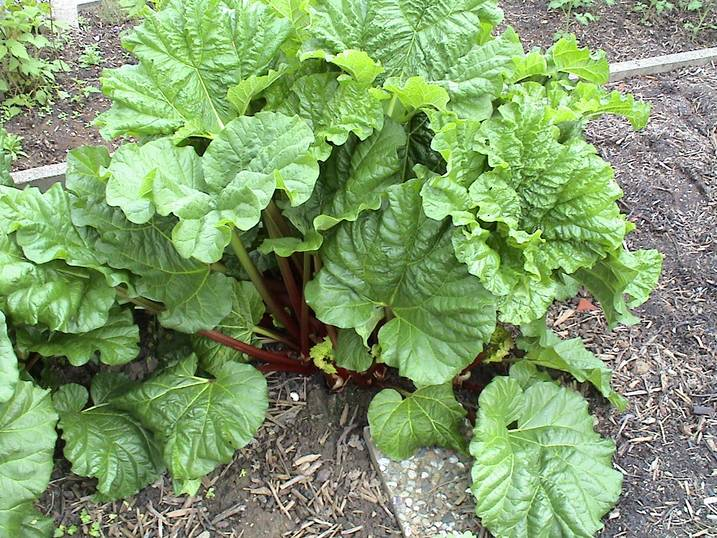 Rhabarber